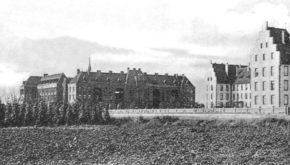 Fotografien von Karl Friedrich Wunder mit Vor- und Rückseite